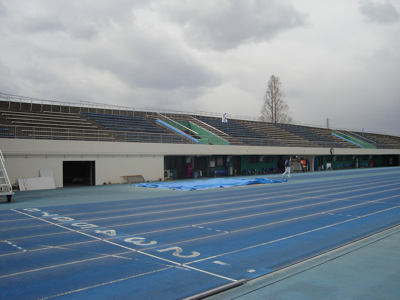 徳島市陸上競技場。 - 日本国徳島県徳島市にある競技場。